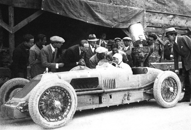 Emilio Materassi su Talbot durante il Circuito del Mugello del 1928